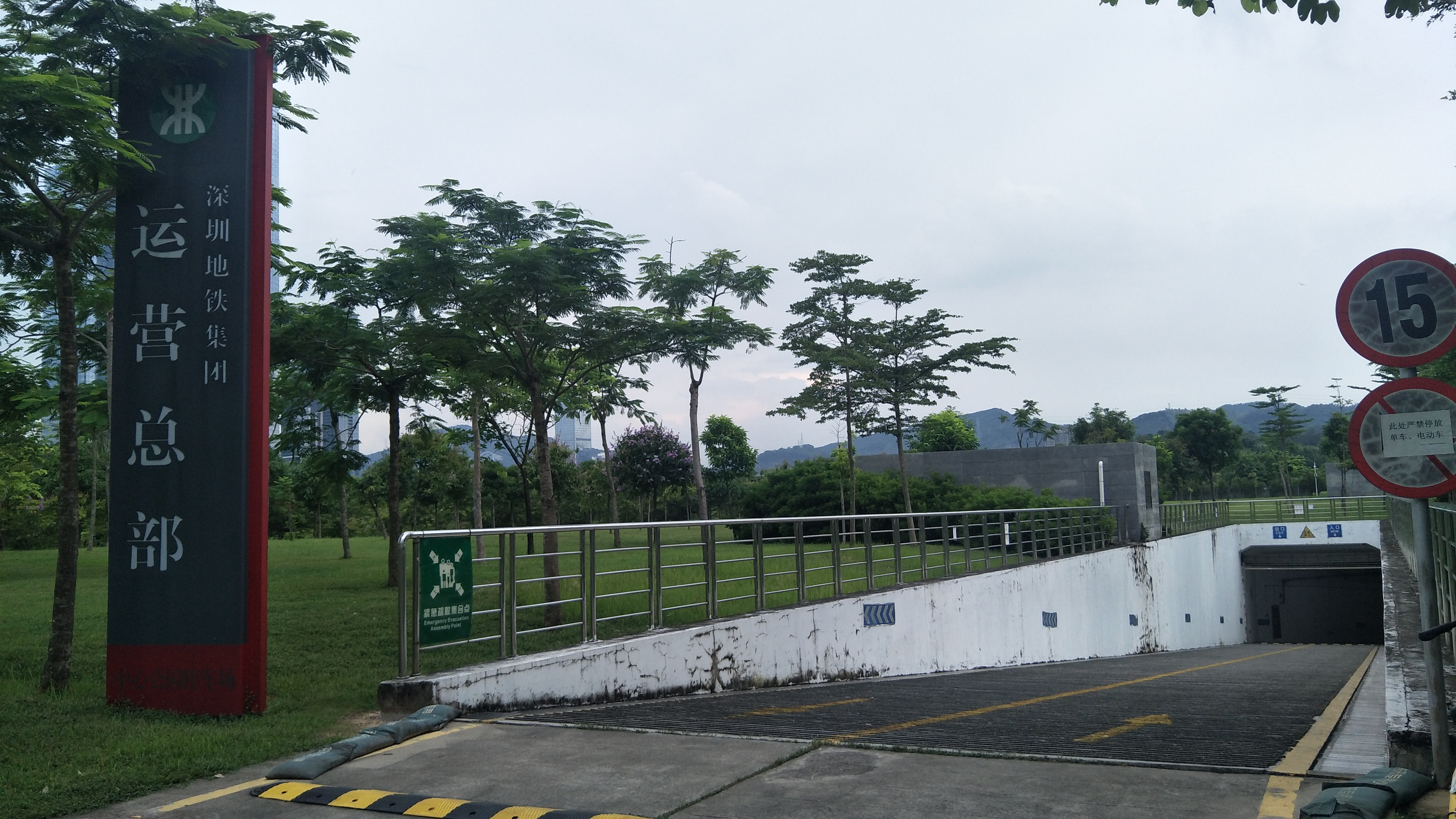 深圳地铁运营总部。位于3号线中心公园停车场